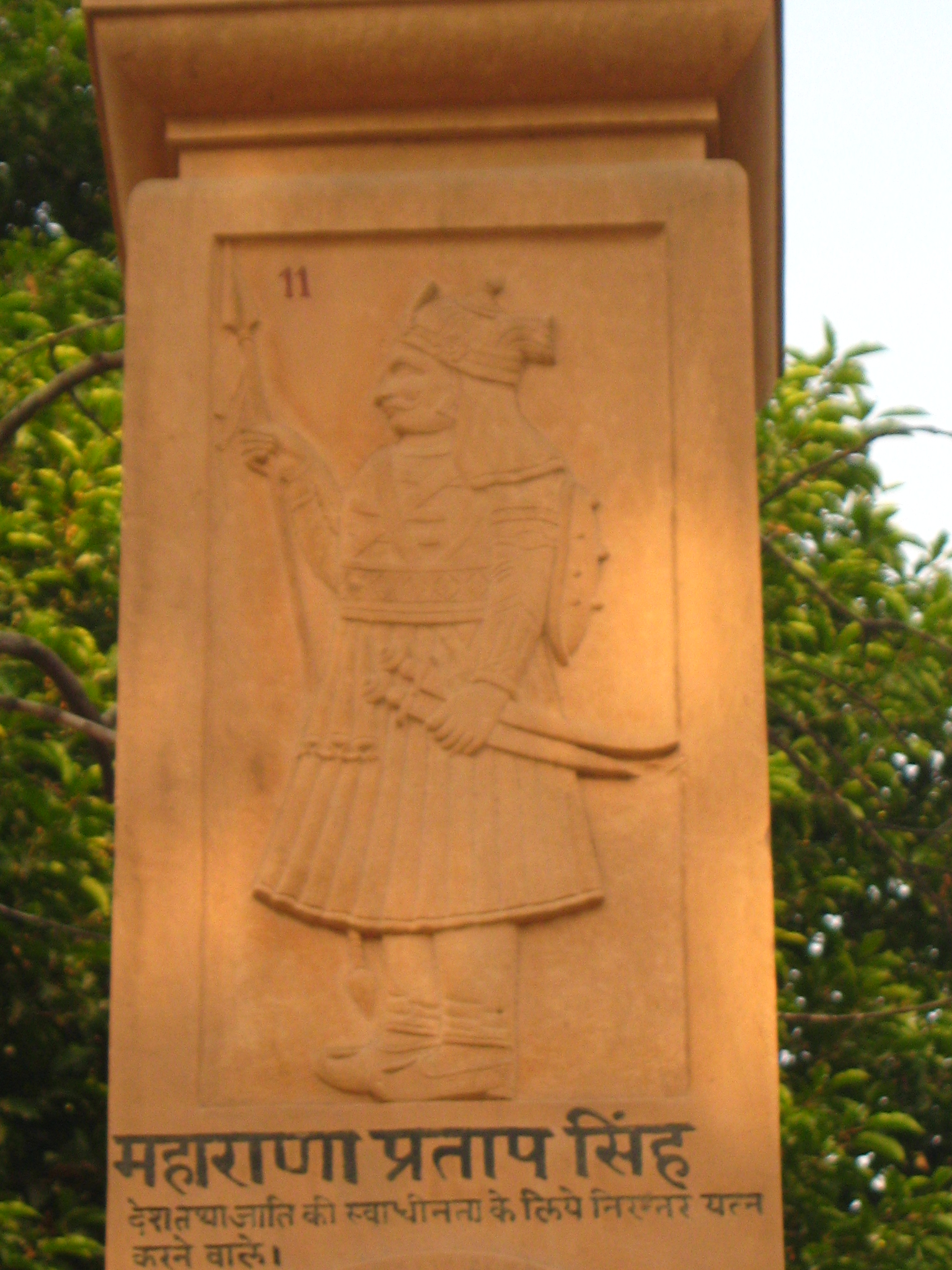 महाराणा प्रताप